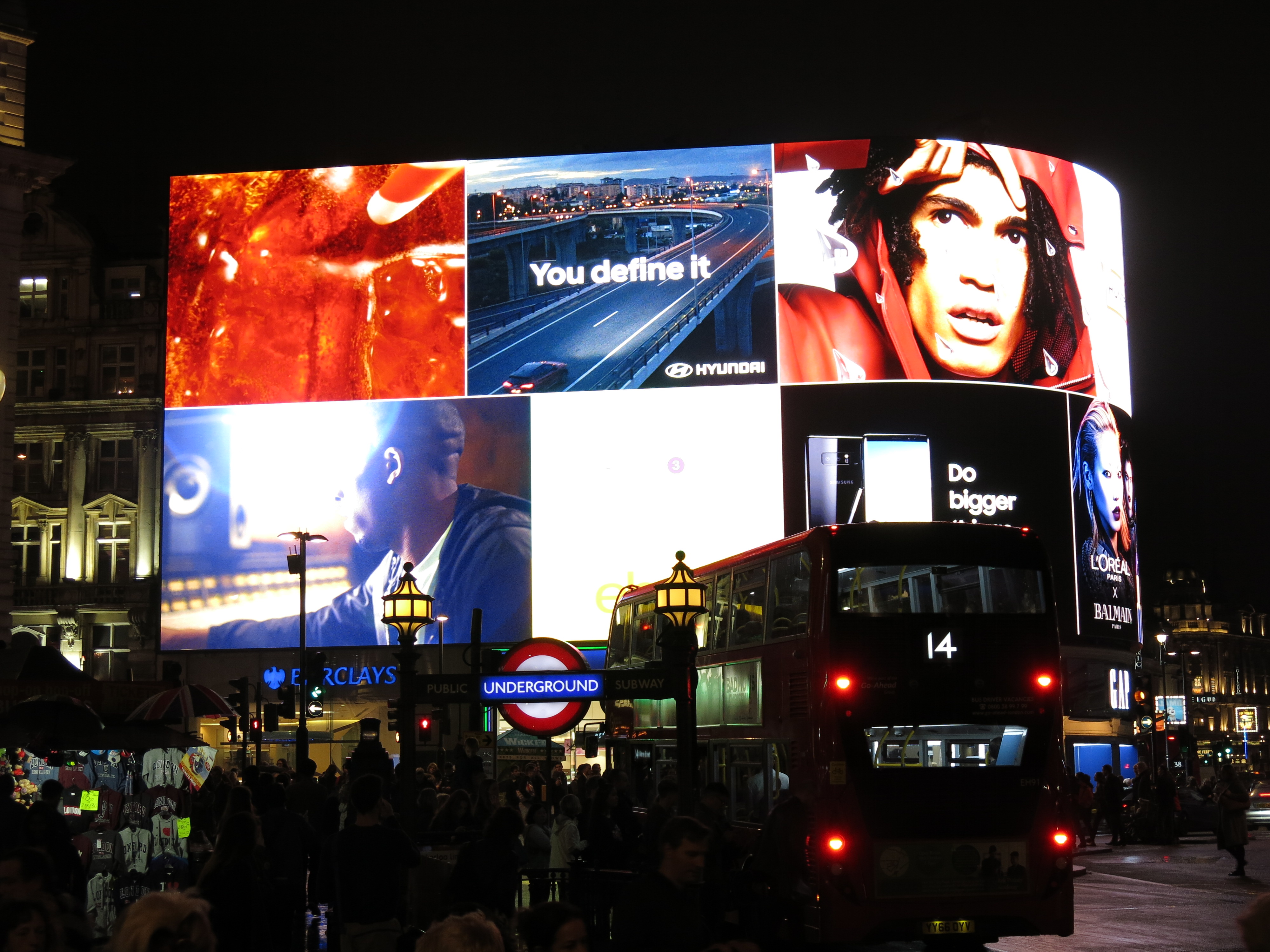 Erster Abend des neuen gebogenen 4K-Displays am Piccadilly Circus